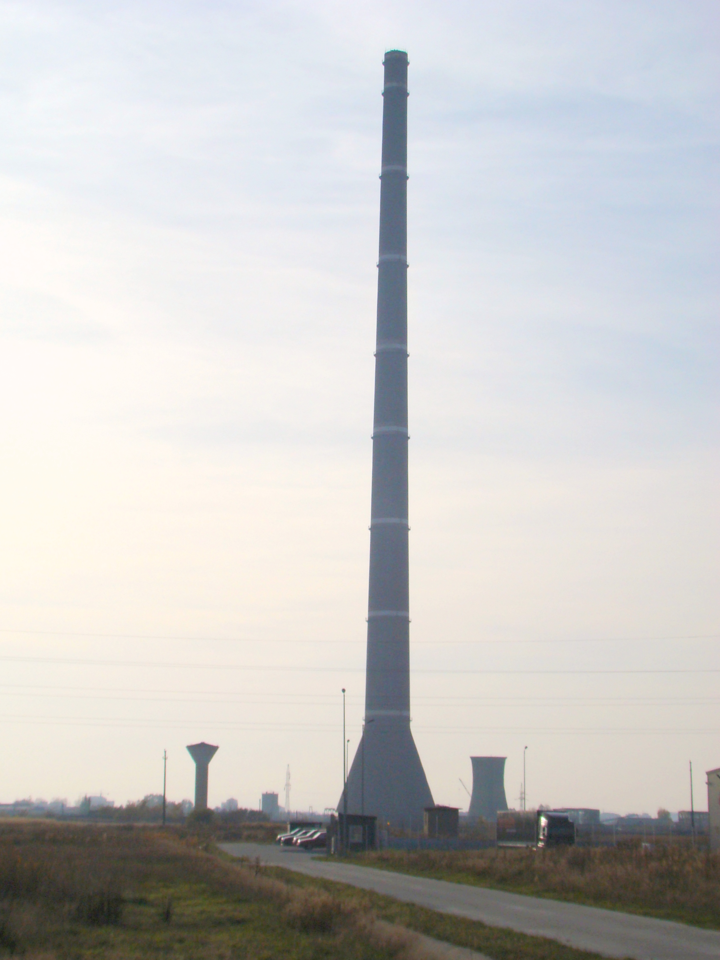 Coșul de dispersie al Combinatului metalurgic din Baja Mare